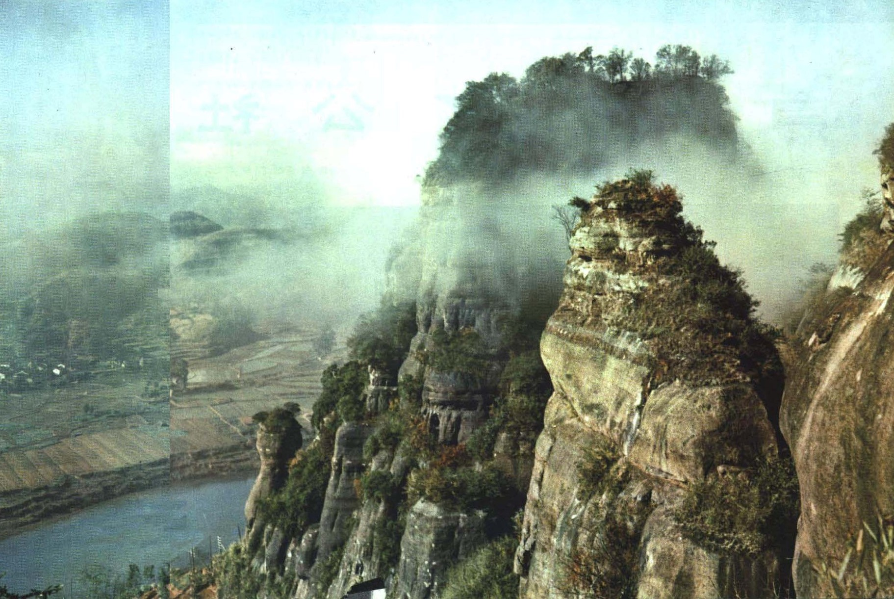 1964-04 1964年 金鸡岭